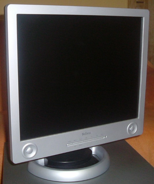 TFT Monitor - GNU-FDL - selbst fotografiert